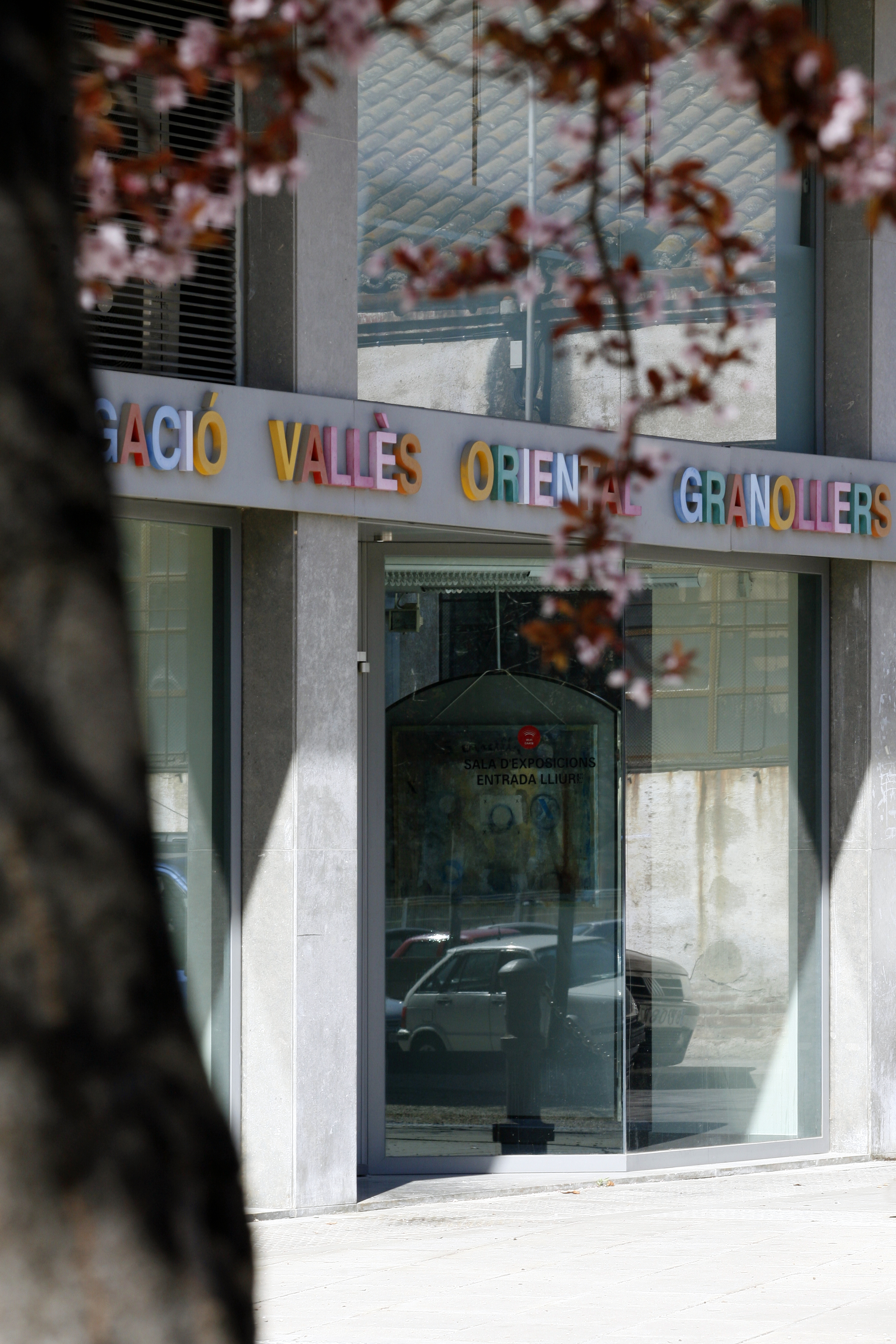 Seu: Granollers, c/ Josep Piñol, 8